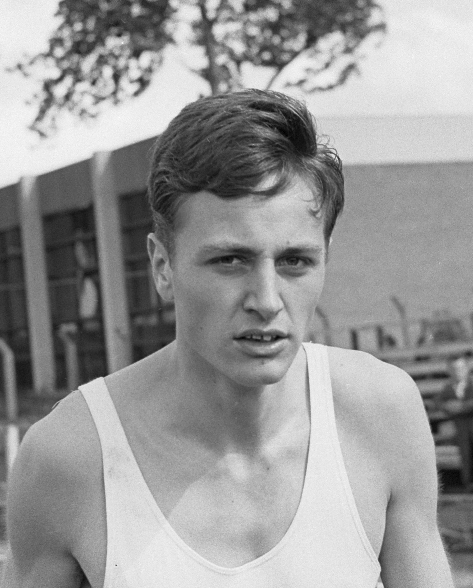 Nederlandse Atletiekkampioenschappen op Nenijtobaan Rotterdam. Finish 100m horden. Frits Luitjes in 10,4 sec